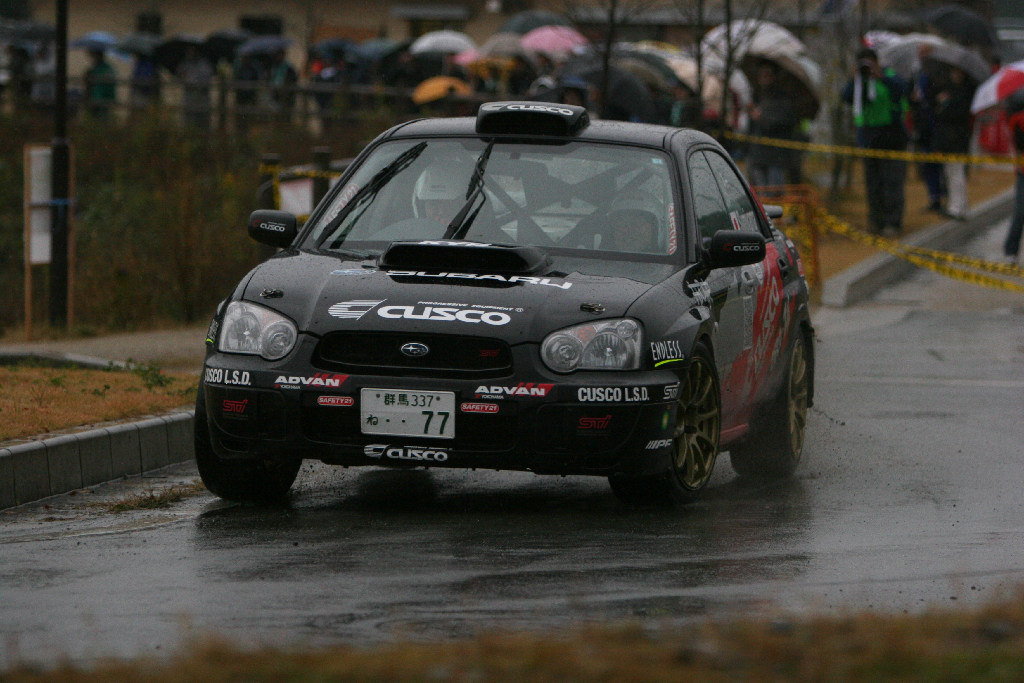 新城ラリー2006